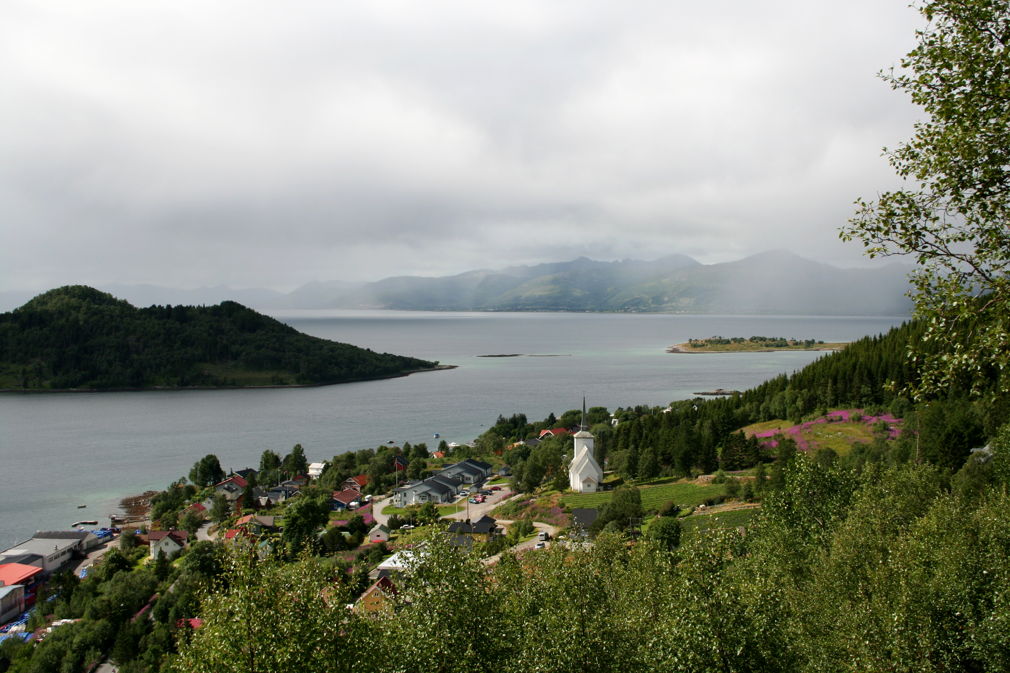 Sigerfjord in Sortland, Norway